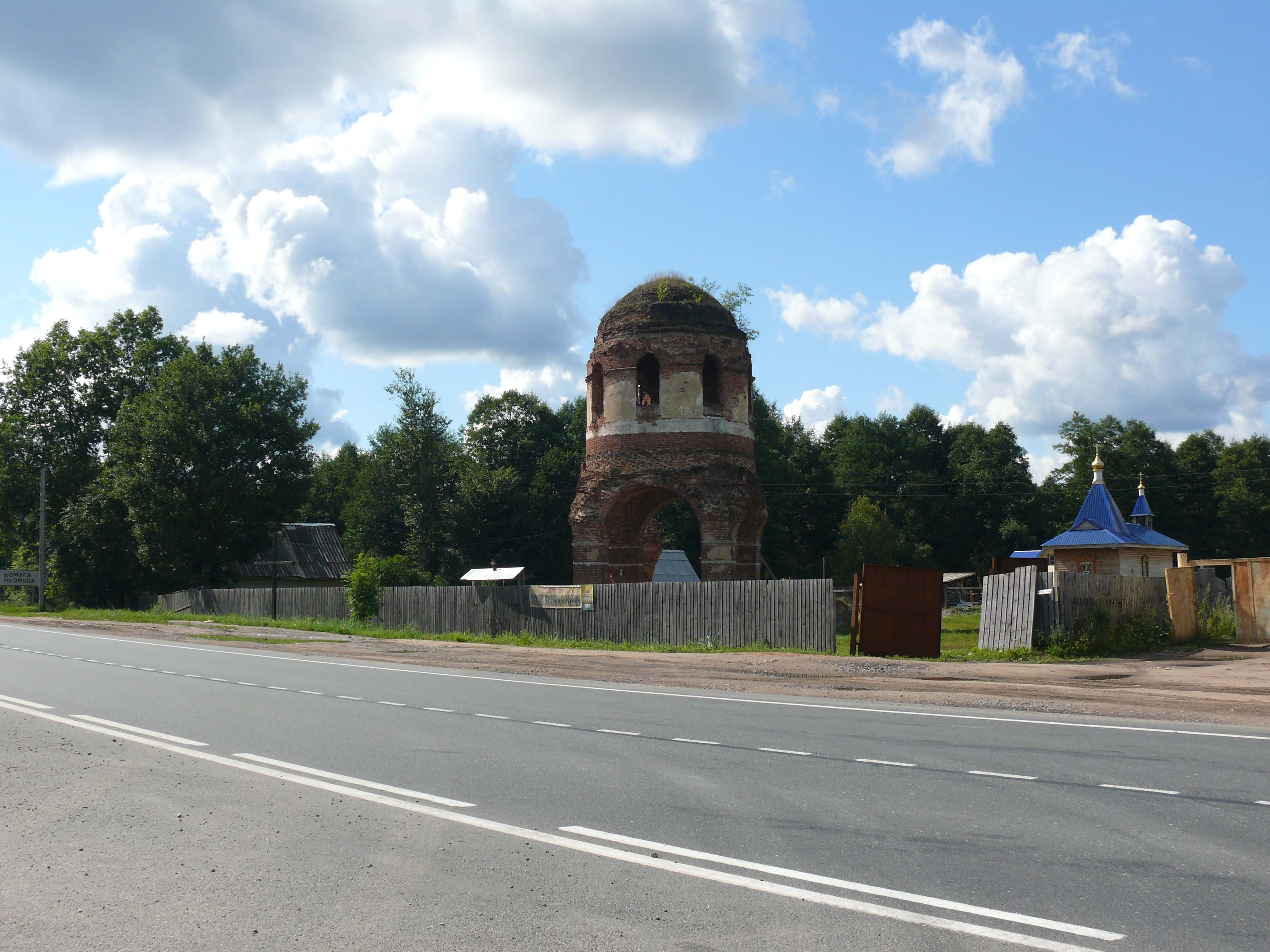 Останки Успенской церкви (1824) в Феофиловой Пустыни, Стругокрасненский район Псковской области Object location58° 15′ 59″ N, 29° 27′ 33″ E